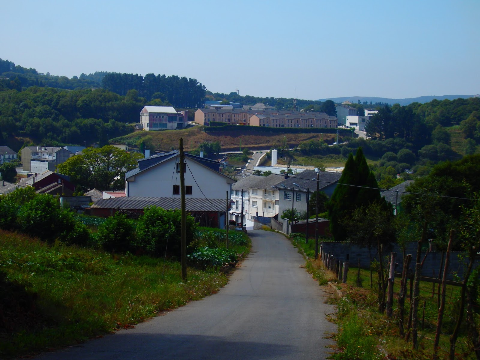 Gontán, Abadín, Abadín.